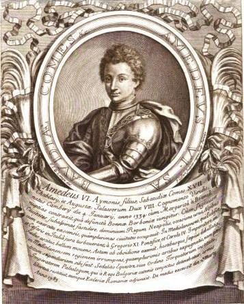 Dibujo del conde Amadeo VI